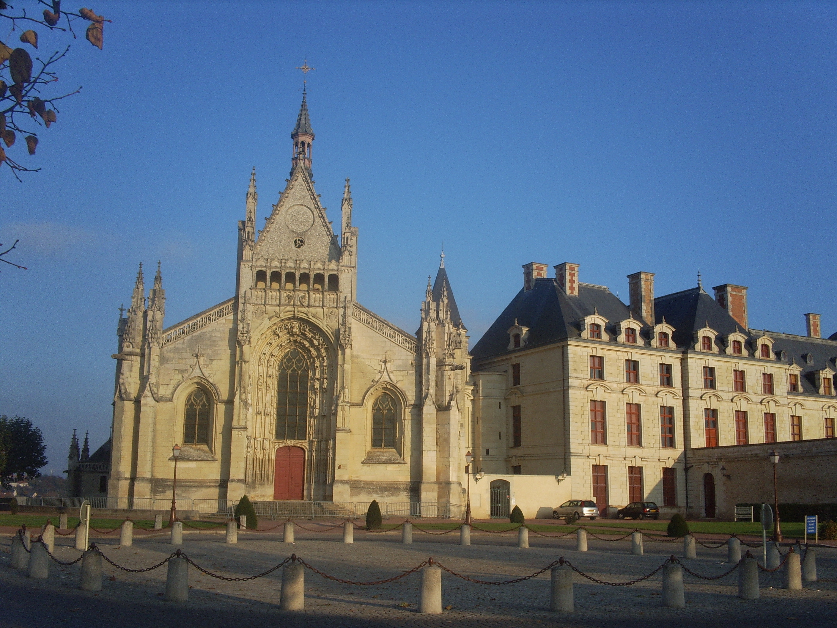 Chapelle du Château des ducs de la Tremoille, Thouars, Deux-Sèvres, France